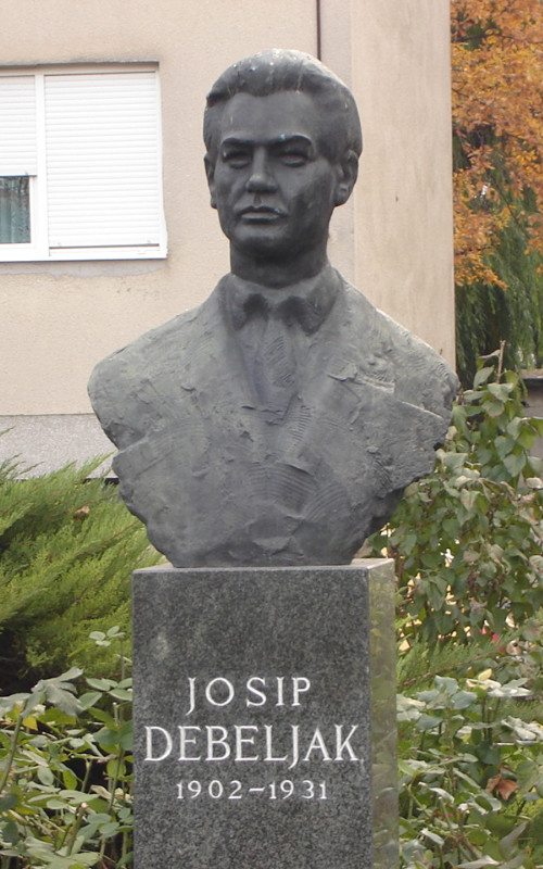 Попрсје Јосипа Дебељака фотографисано 15. новембра 2009. године у Загребу